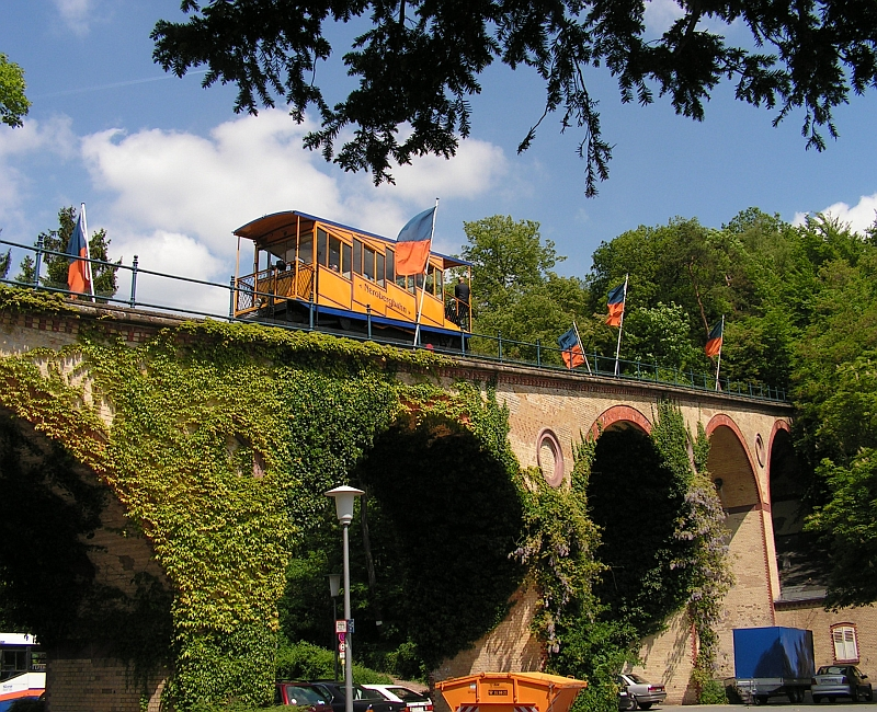 Wiesbaden Nerobergbahn ESWE Verkehrsbetriebe auf Viadukt von 1907 von Talstation zum Hausberg Foto 2008 Wolfgang Pehlemann Wiesbaden 0ICT0061